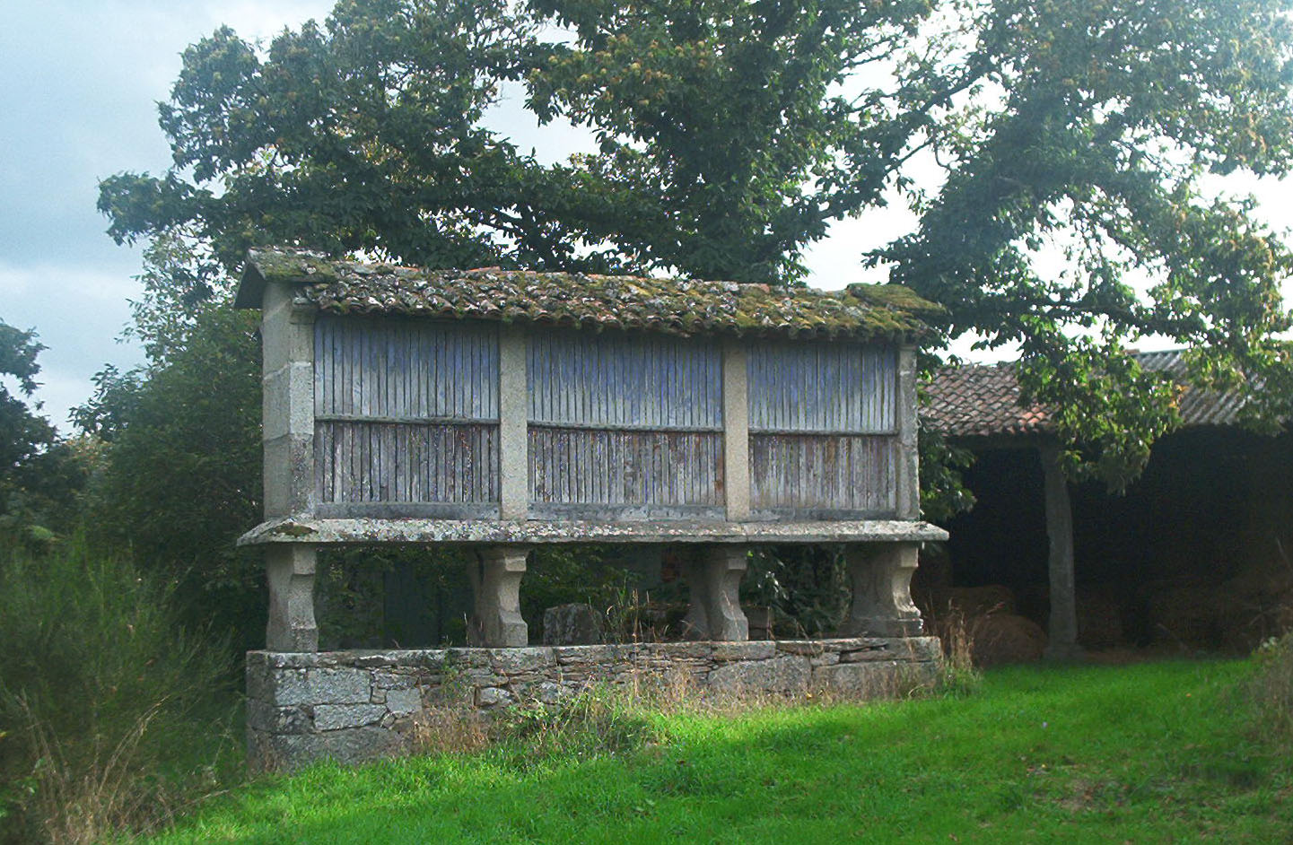 Hórreo tipo mahía sobre soleira de mampostería e catro cepas. De tres claros e con cuberta de tella do país. Na actualidade non presenta adornos. Ubicado no lugar de Velanxil, parroquia de Peibás, no Concello lugués de Antas de Ulla.